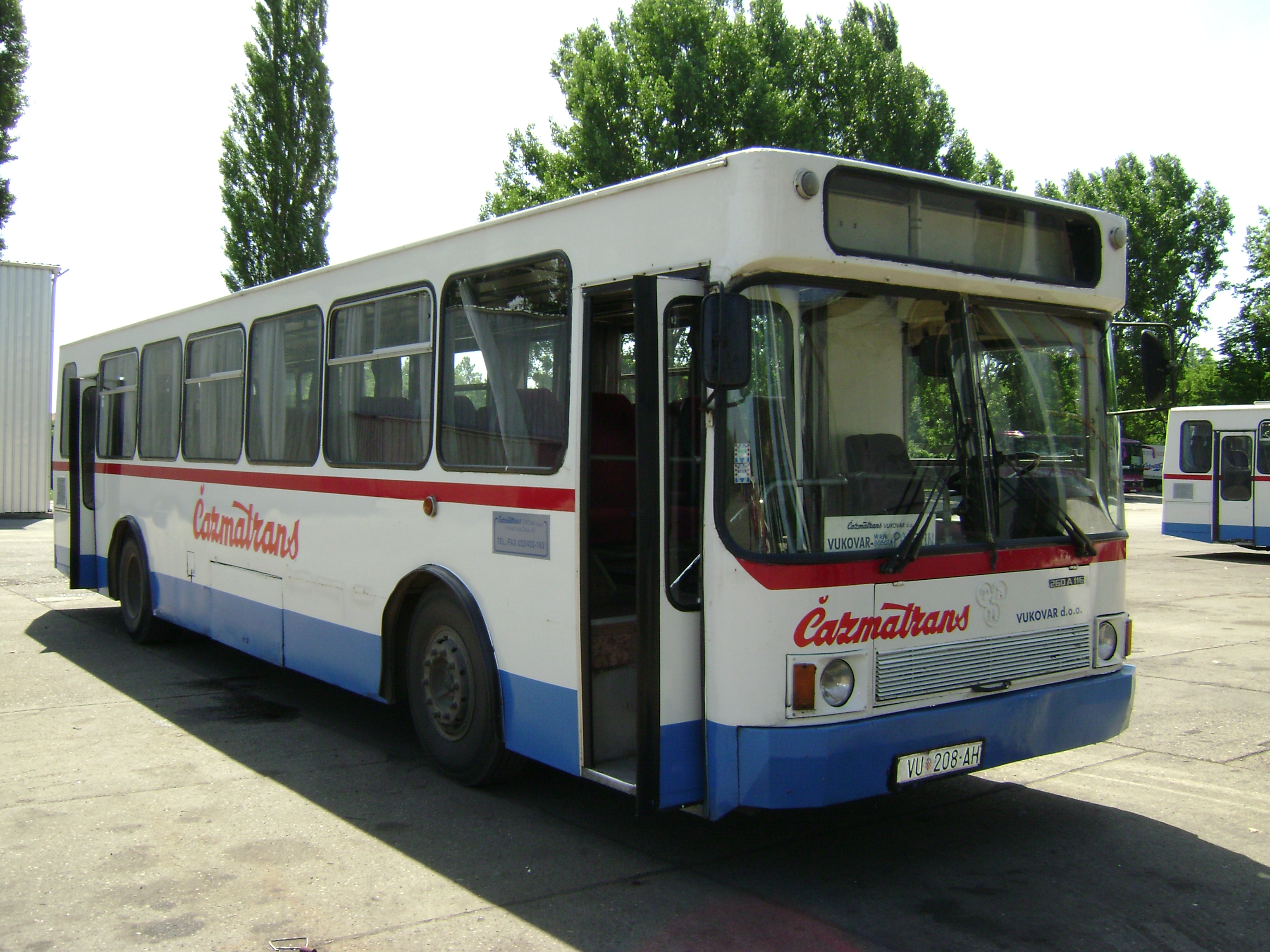 Autobus TAM 260 A 116 P